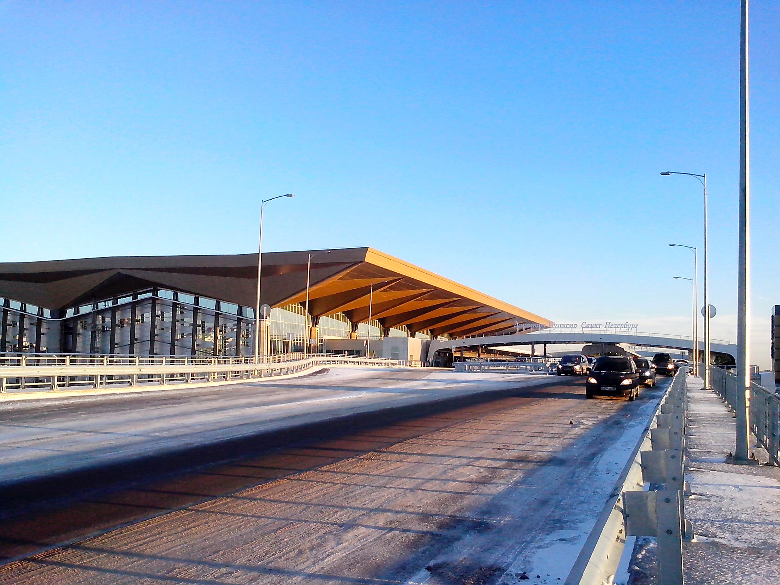 Выезд из нового терминала. New Terminal' exit